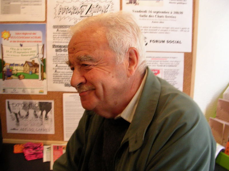 Maurice Rajsfus à Orléans...